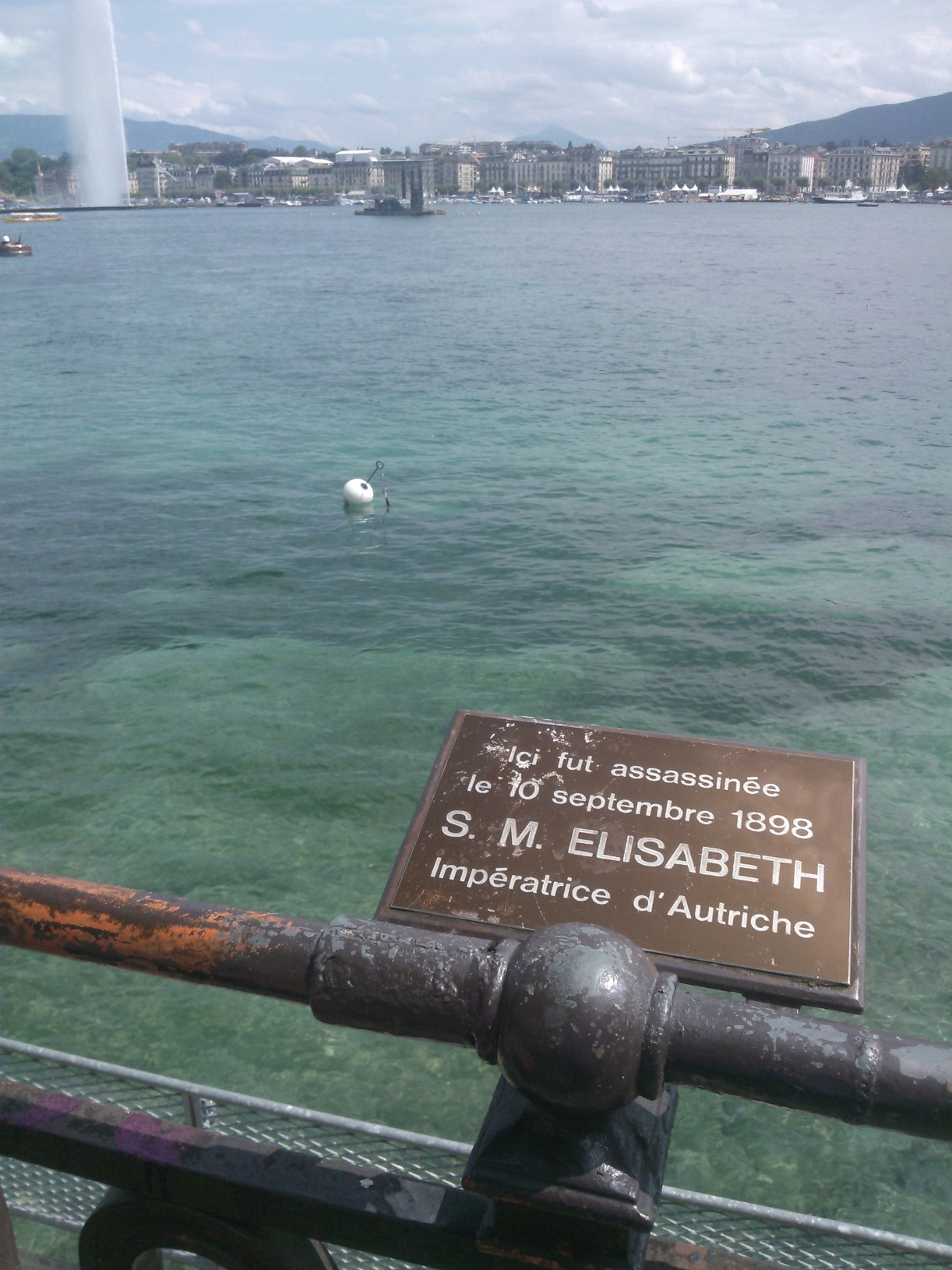 Plaque commémorative du meurtre d’Élisabeth d’Autriche a Genève (suisse) Deuxieme plan le lac leman et troisième plan le Jet d'eau de Genève